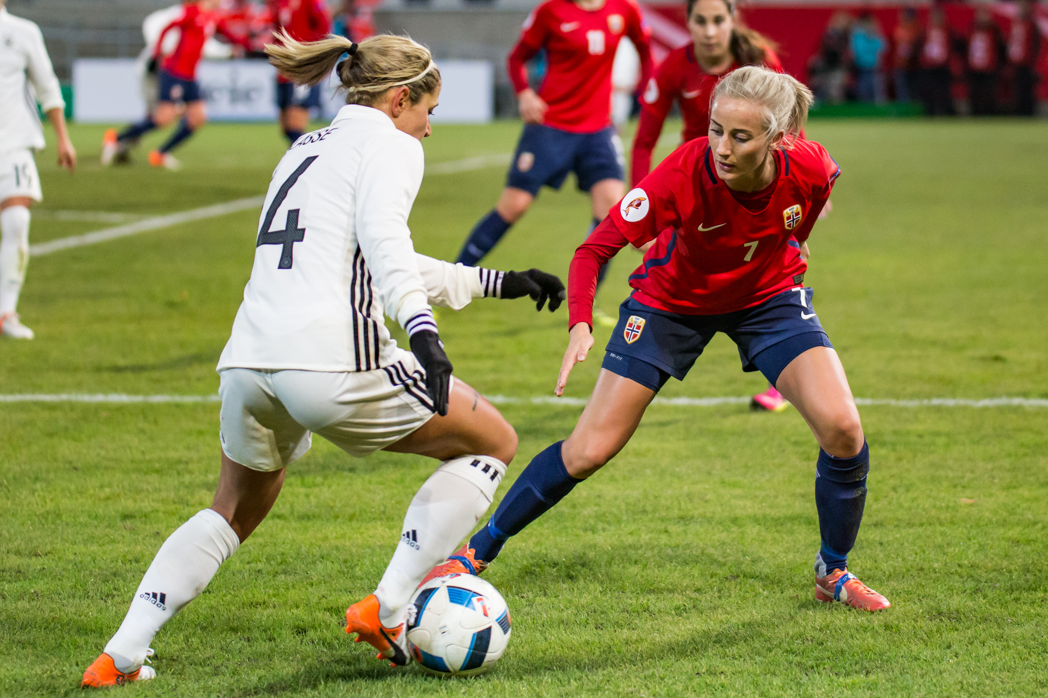 Fußball, Frauen, Länderspiel, Deutschland - Norwegen; v.li.: Anna Blässe (GER, 14), Anja Sonstevold (NOR, 7)